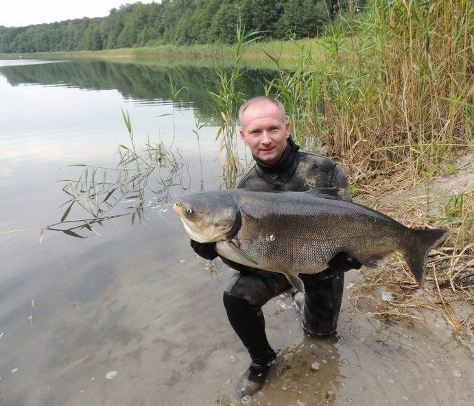 Łowiectwa podwodnego